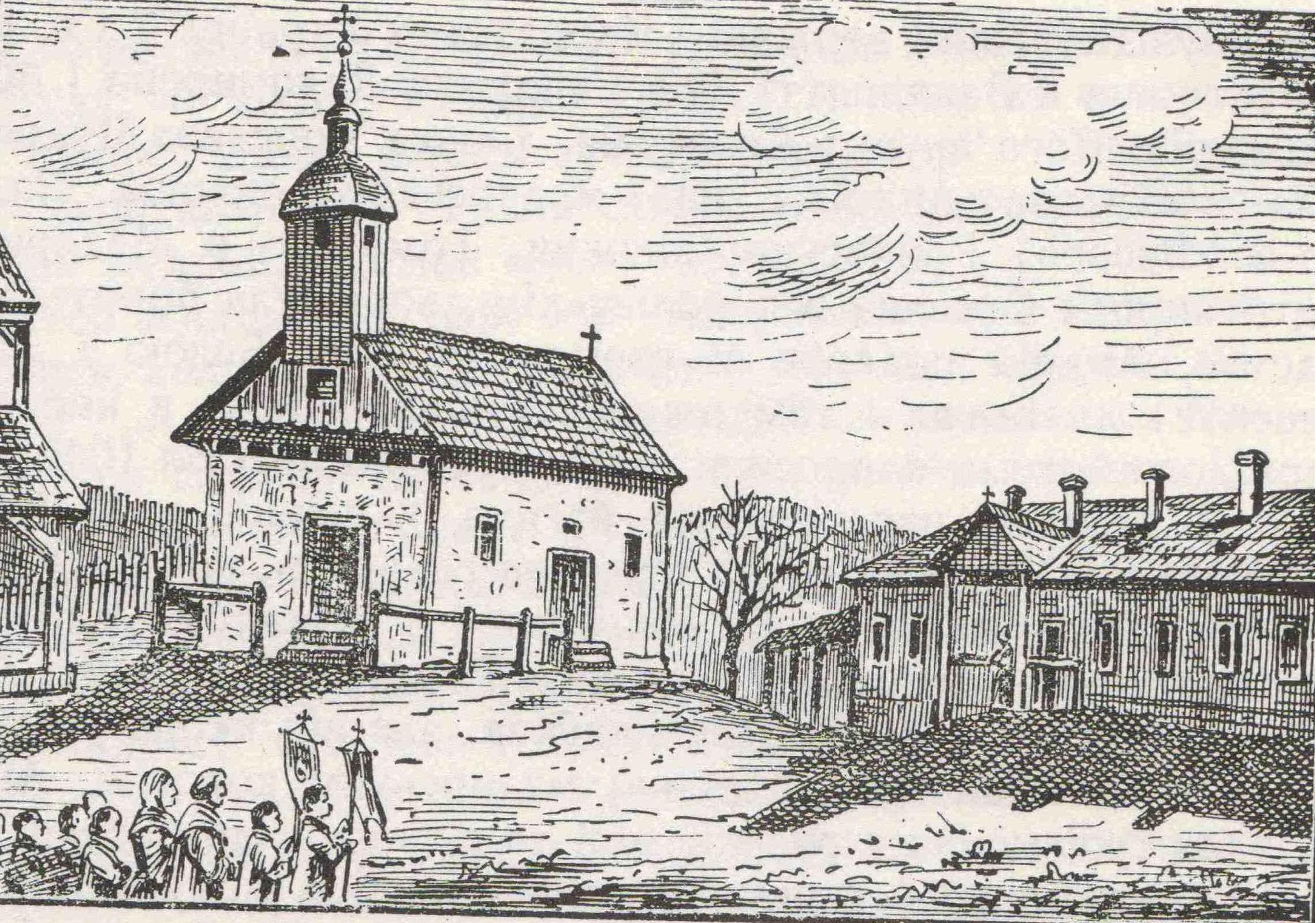 Боронявський монастир. Старовинна гравюра